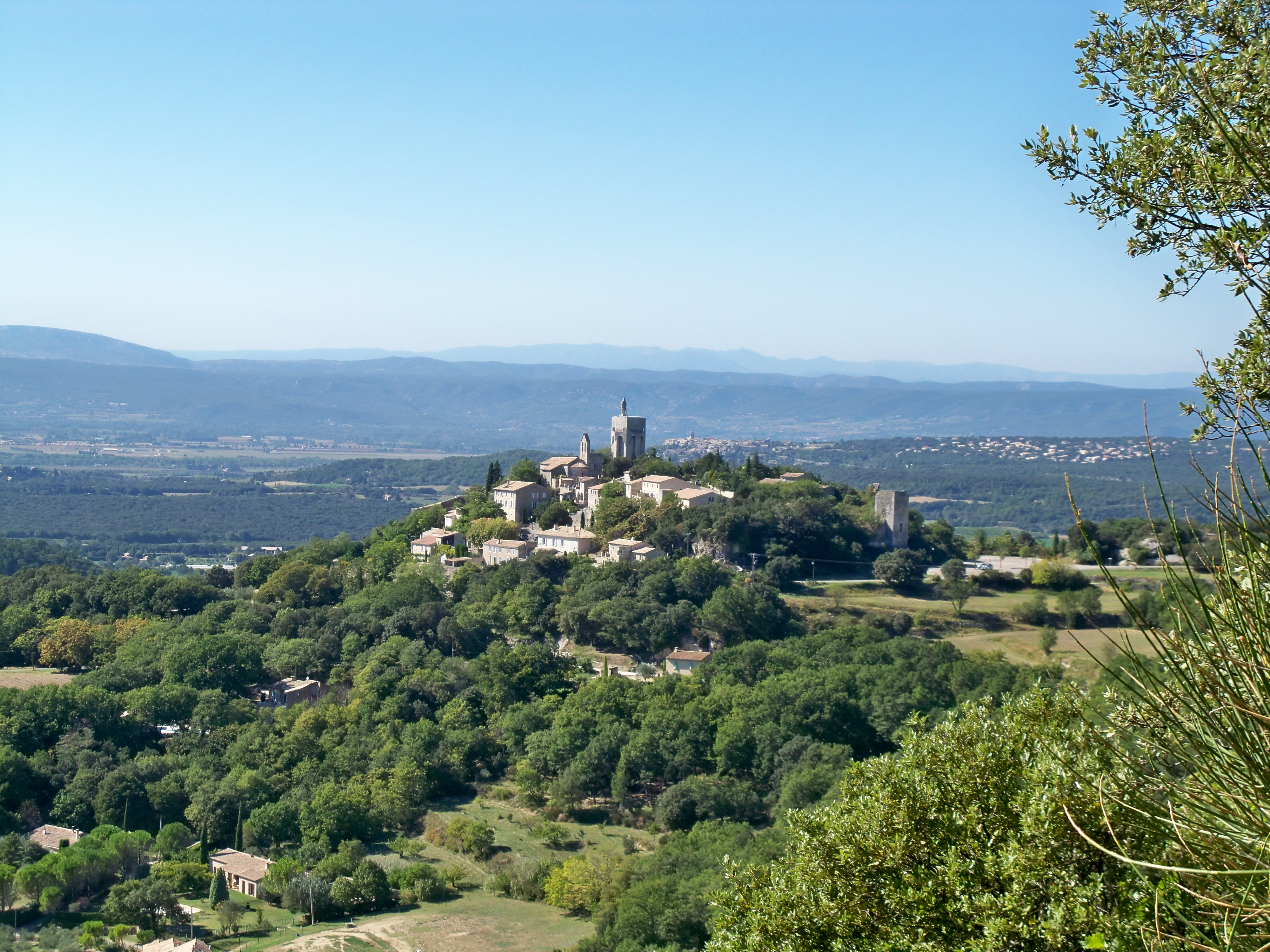 vue sur le village de Clansayes (26)